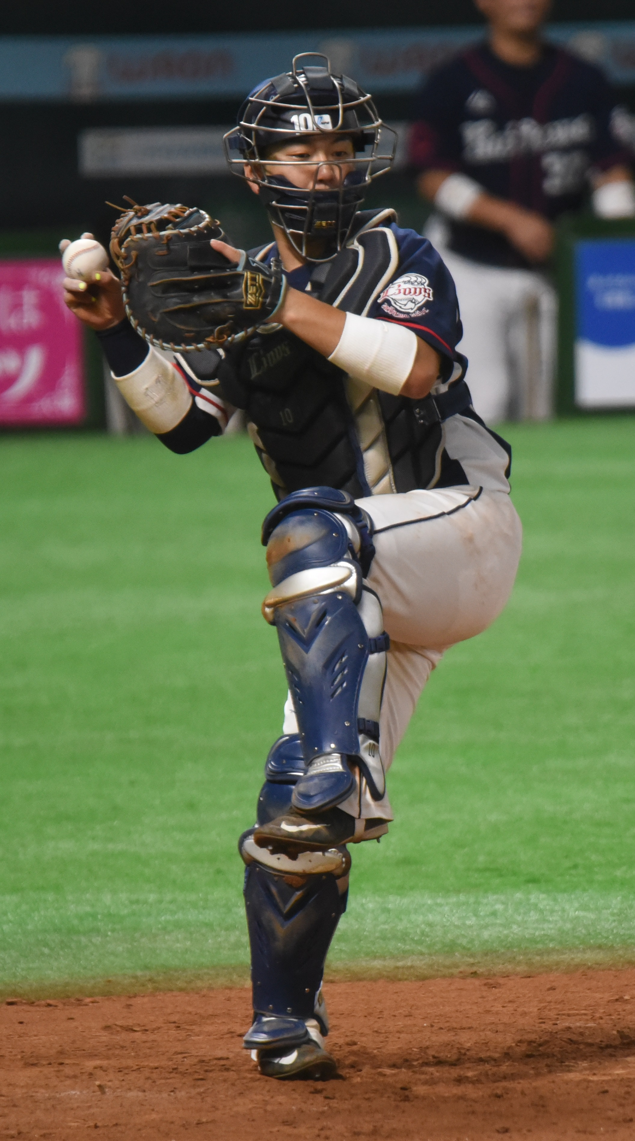 埼玉西武ライオンズの森友哉捕手。2016年9月11日、福岡ヤフオク!ドームにて。